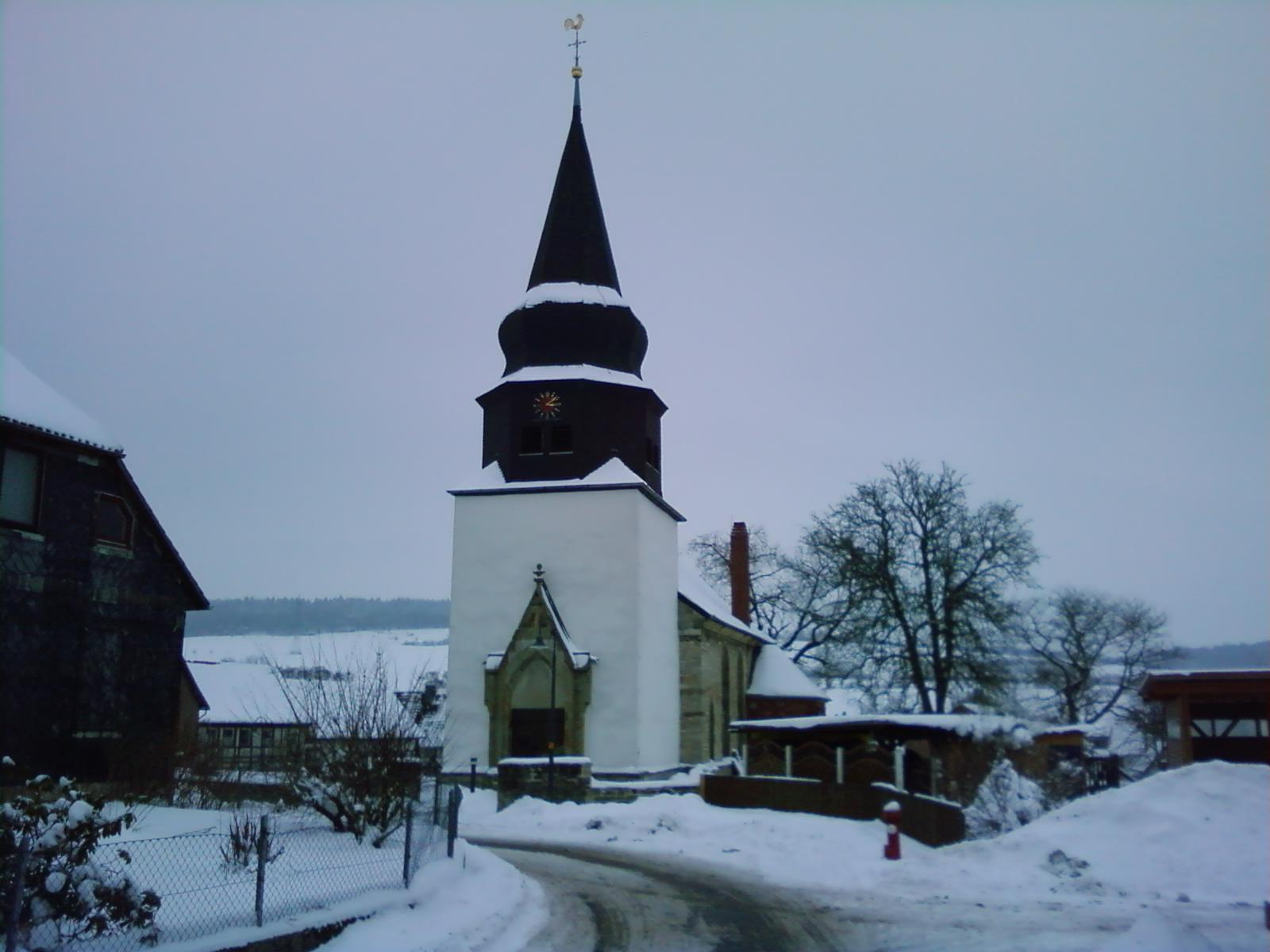 Die Kirche in Graste